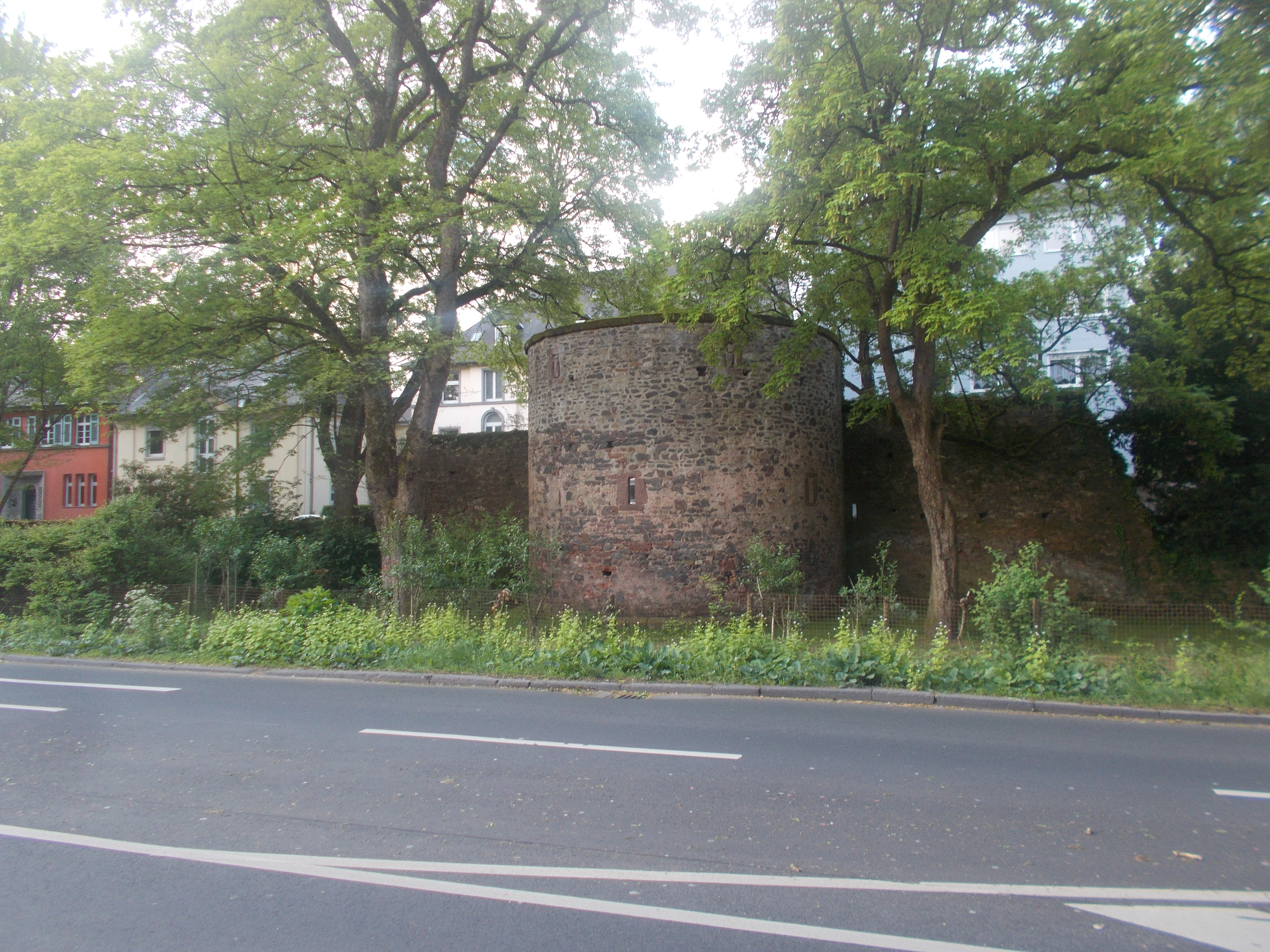 Stadtmauerreste in der Trierer Nordallee